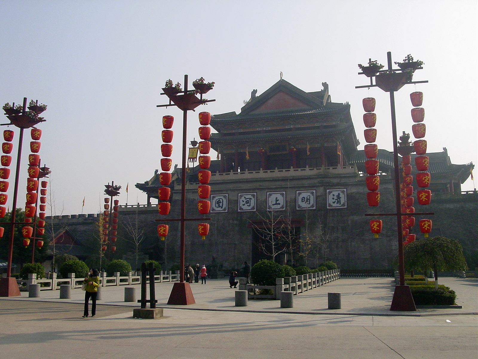 横店影视城（清明上河图）